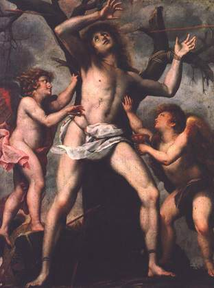 Saint Sèbastien, h/toile, 196 x 147 cm, San Gemini, Italie, Dôme